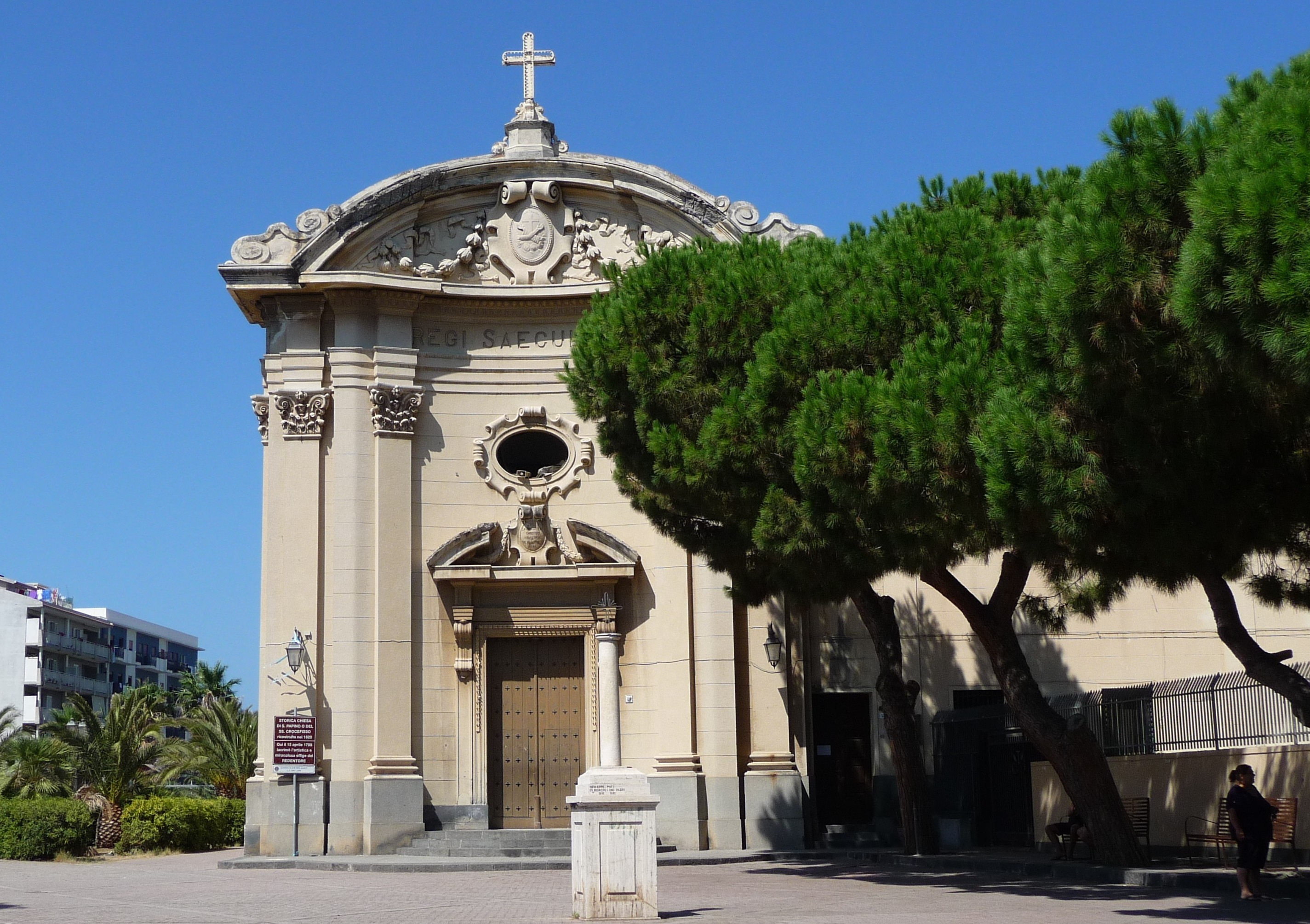 Facciata della seicentesca Chiesa di San Papino Martire - Milazzo (Messina)